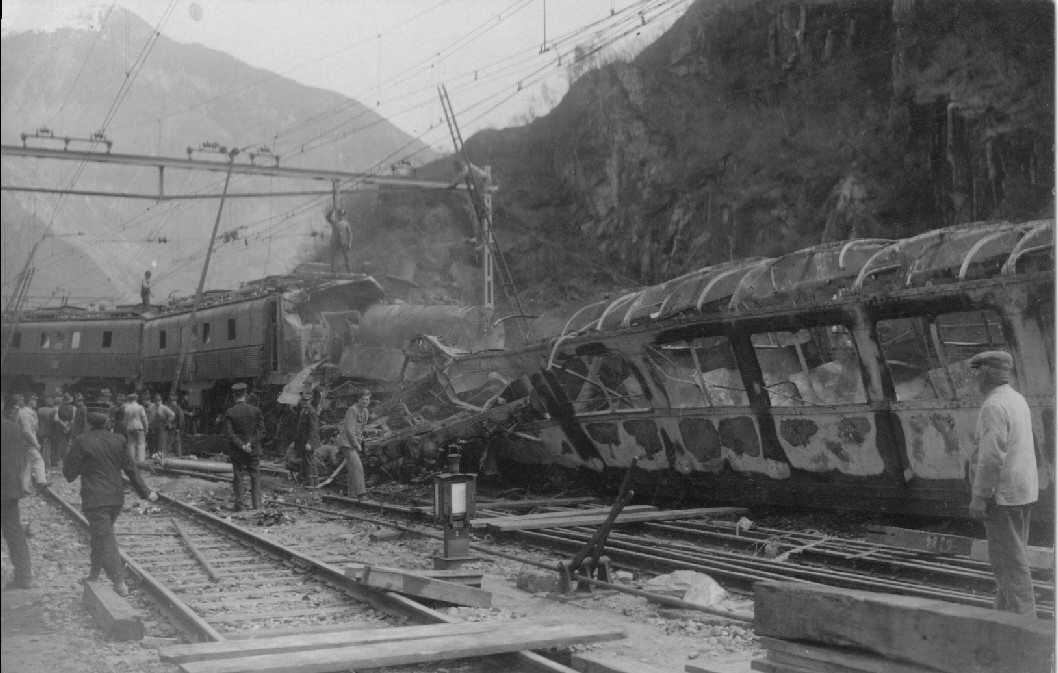 Am 23. April 1924 stießen im Bahnhof Bellinzona die Schnellzüge 70 und 51b zusammen. Der eine Zug hatte ein auf Halt stehendes Signal überfahren. Ein deutscher Personenwagen mit Gasbeleuchtung, der in einem der Züge mitlief, geriet dabei in Brand. 15 Menschen starben, zahlreiche weitere wurden verletzt.